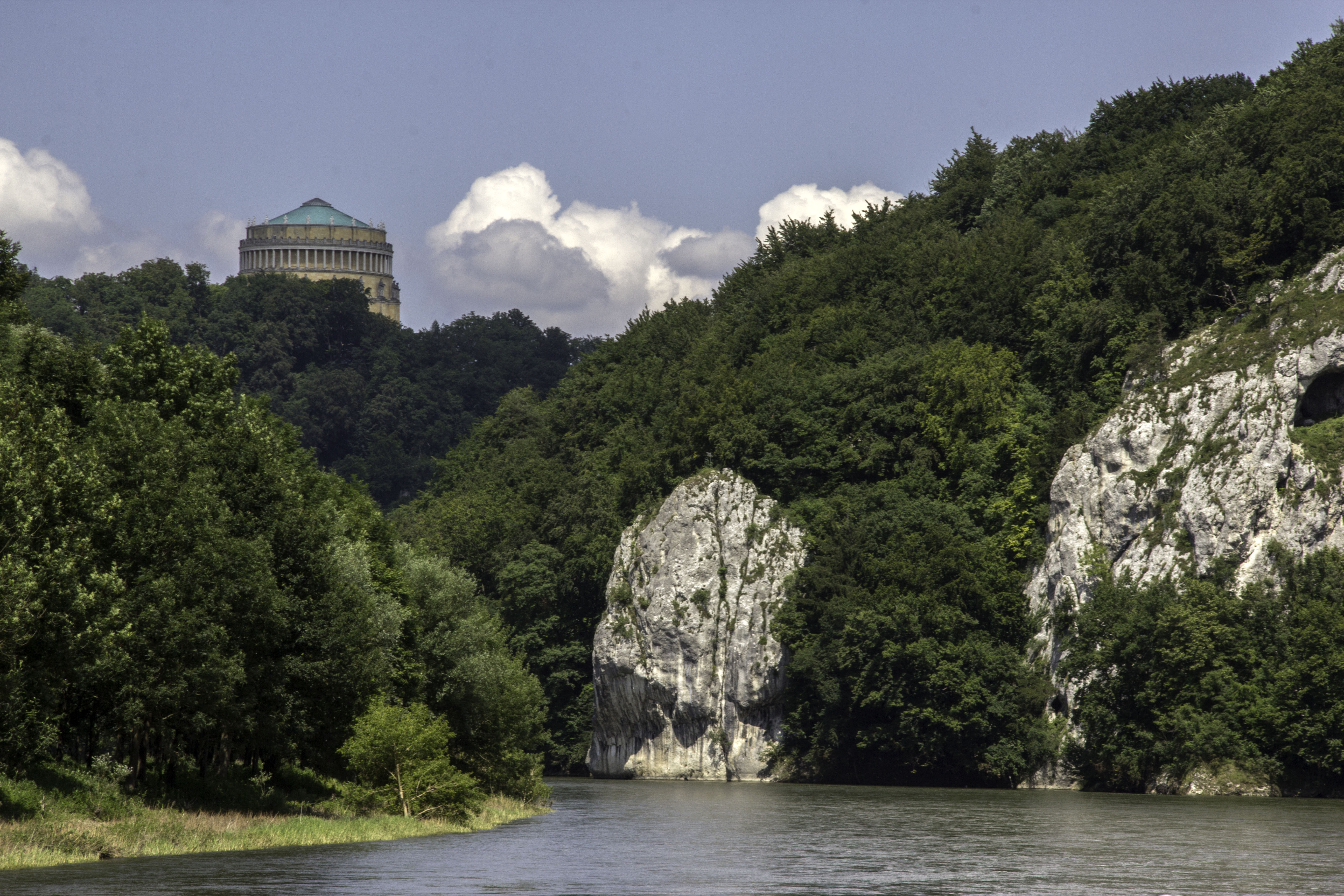 Weltenburger Enge, Donau, Blick auf Befreiungshalle